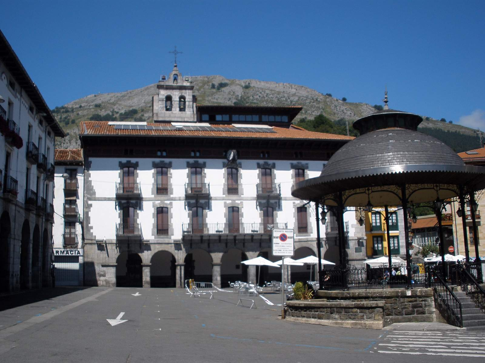 Estampas urbanas de Azpeitia (Gipuzkoa)